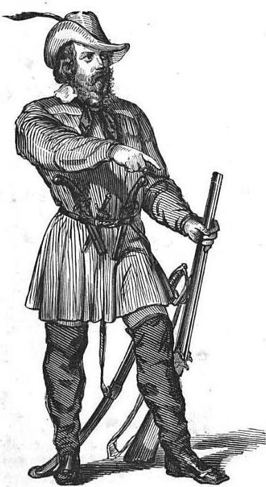 Friedrich Hecker.